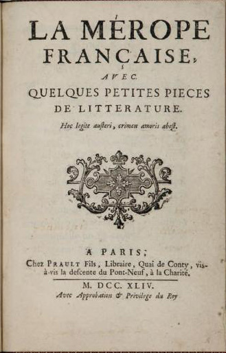 Page de titre de l'édition originale de la Mérope de Voltaire, à Paris, chez Prault, en 1744